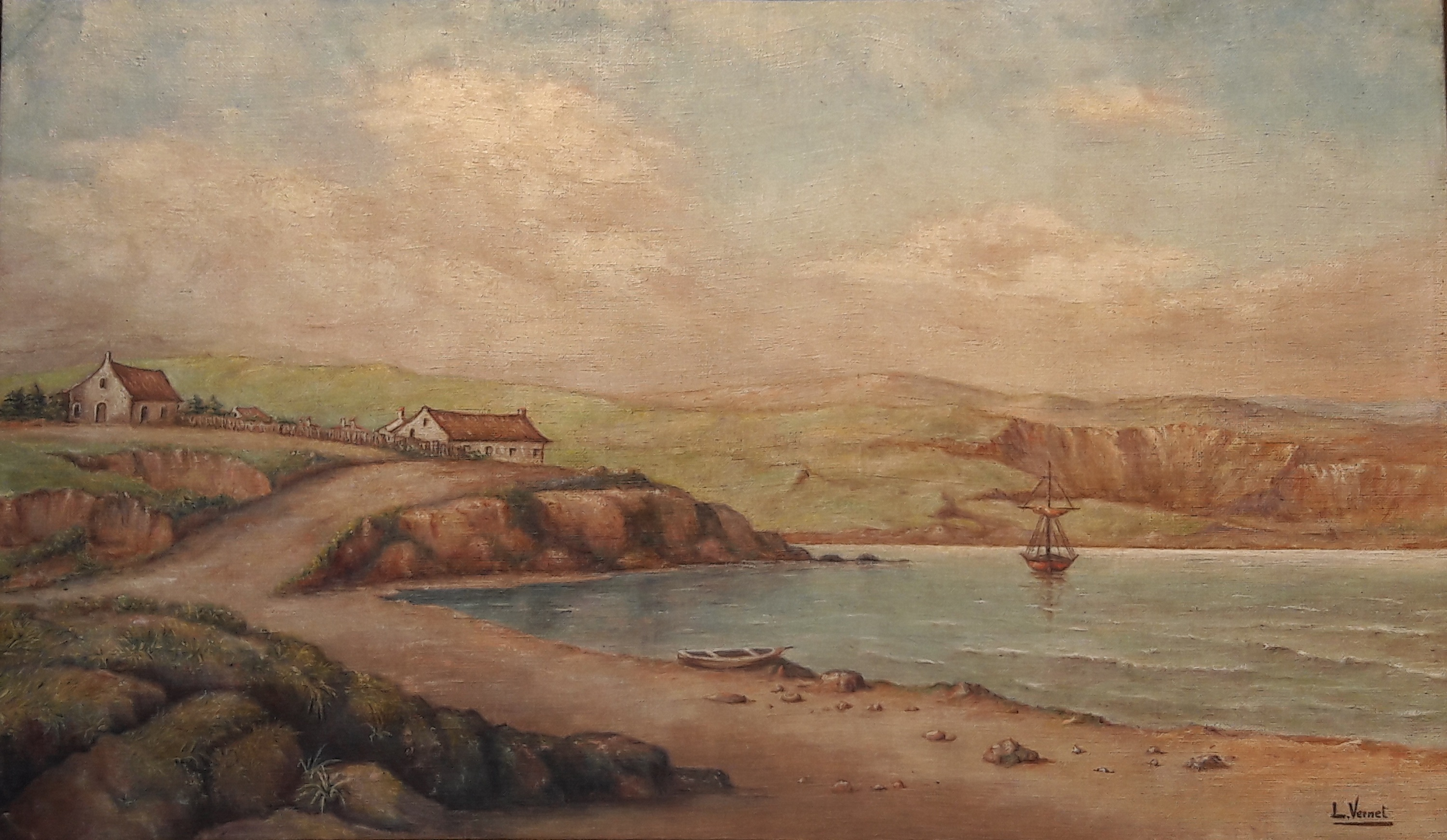 Óleo de Luisa Vernet Lavalle de Llovera. Puerto Soledad, Malvinas. 1829. Museo Histórico Nacional, Buenos Aires. Actualmente en el Museo Malvinas, Núñez, Buenos Aires, Argentina.